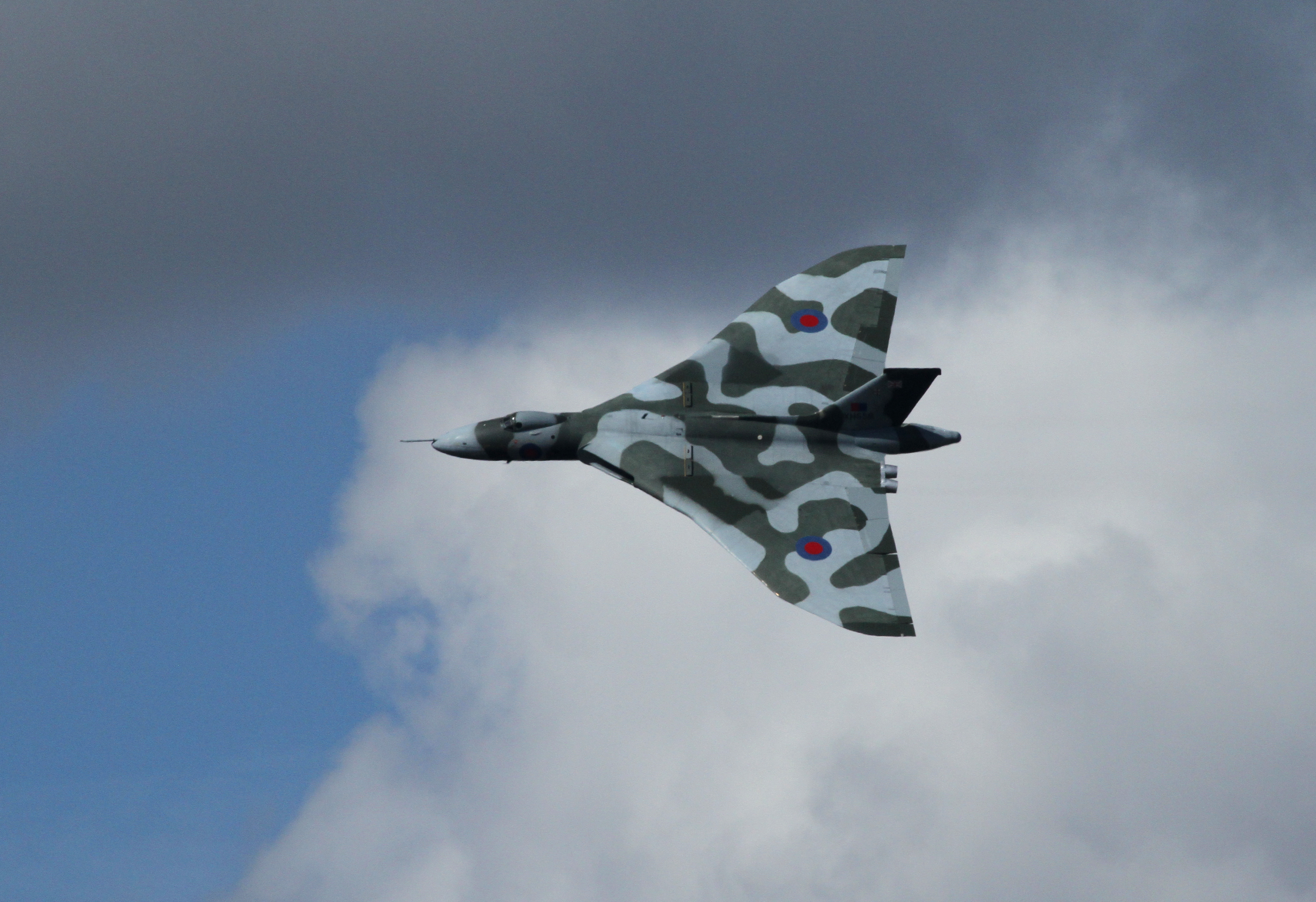 Avro Vulcan V2 07